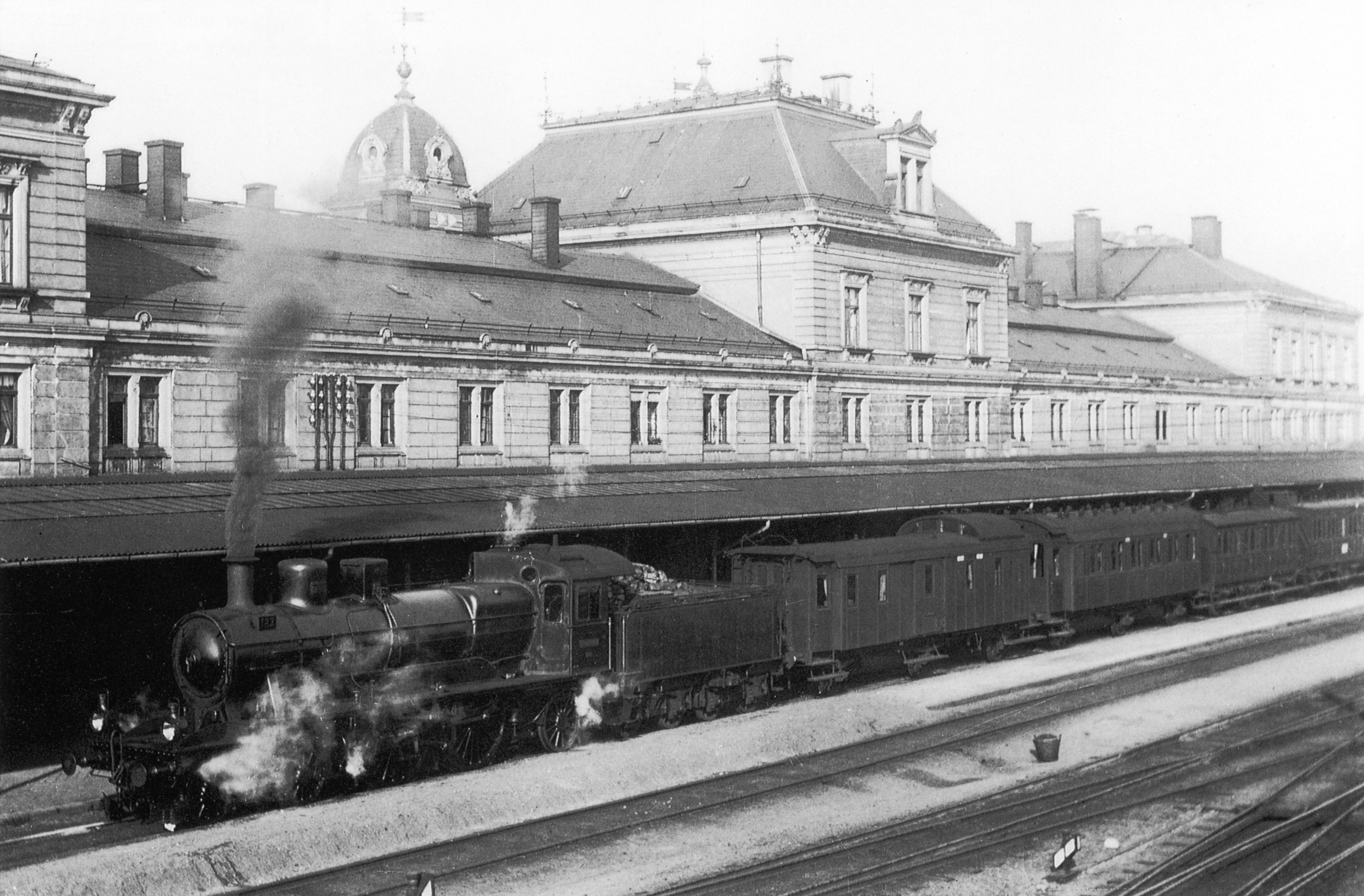 Dampflokomotive Sächsische X V vor dem Bahnhof Altenburg.